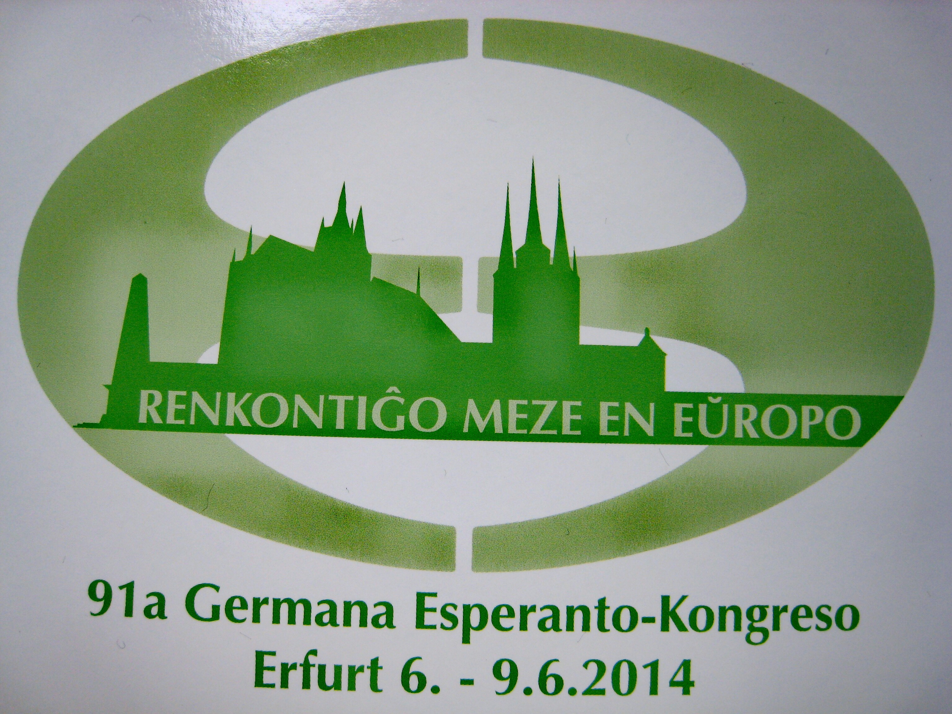 91. Deutscher Esperantokongreß Juni 2014 am Evangelischen Ratsgymnasium in Erfurt, Logo mit dem Domberg.